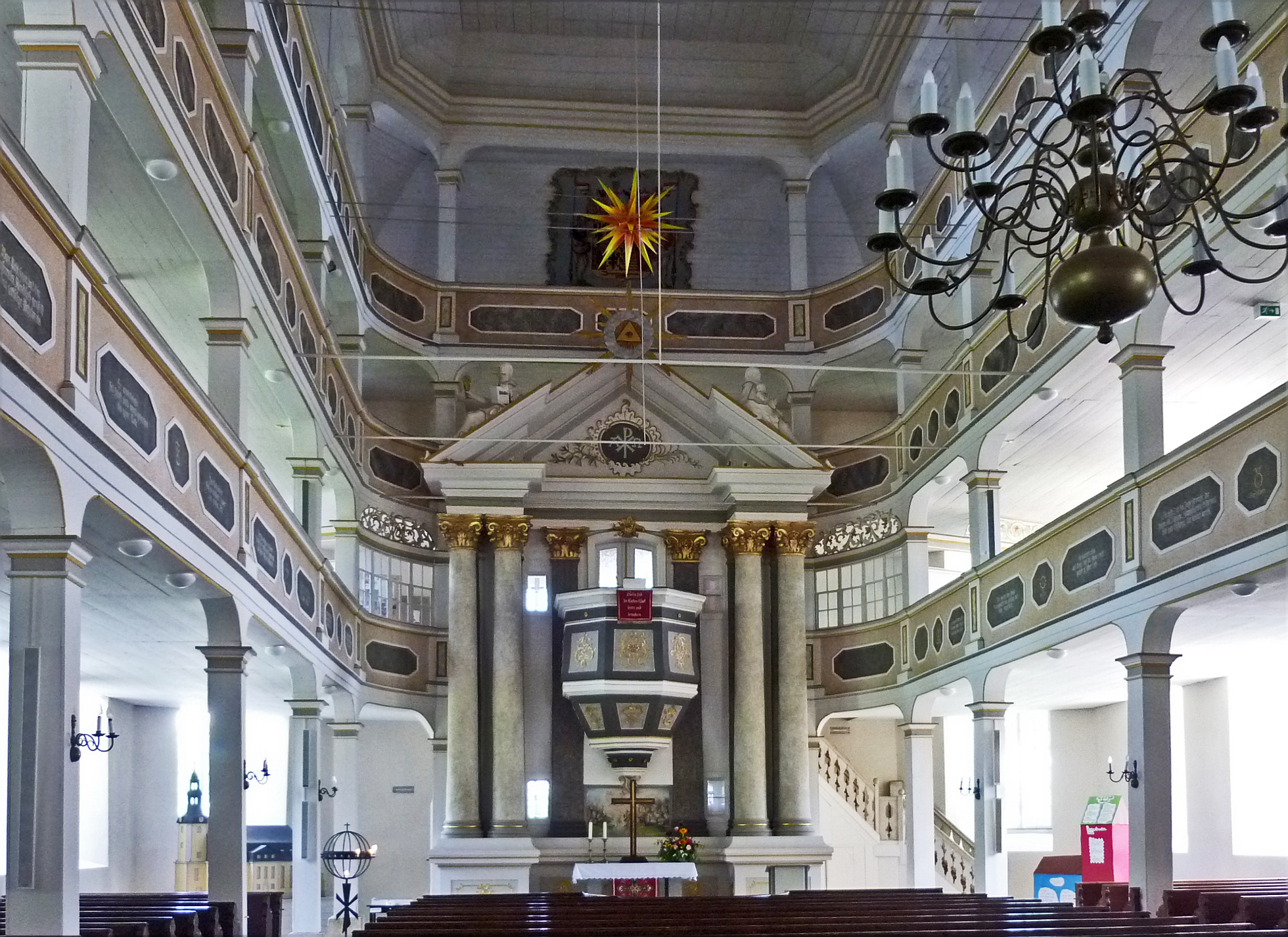 Altar und Innenraum der Hoffnungskirche in Oberweißbach/Thür. Wald